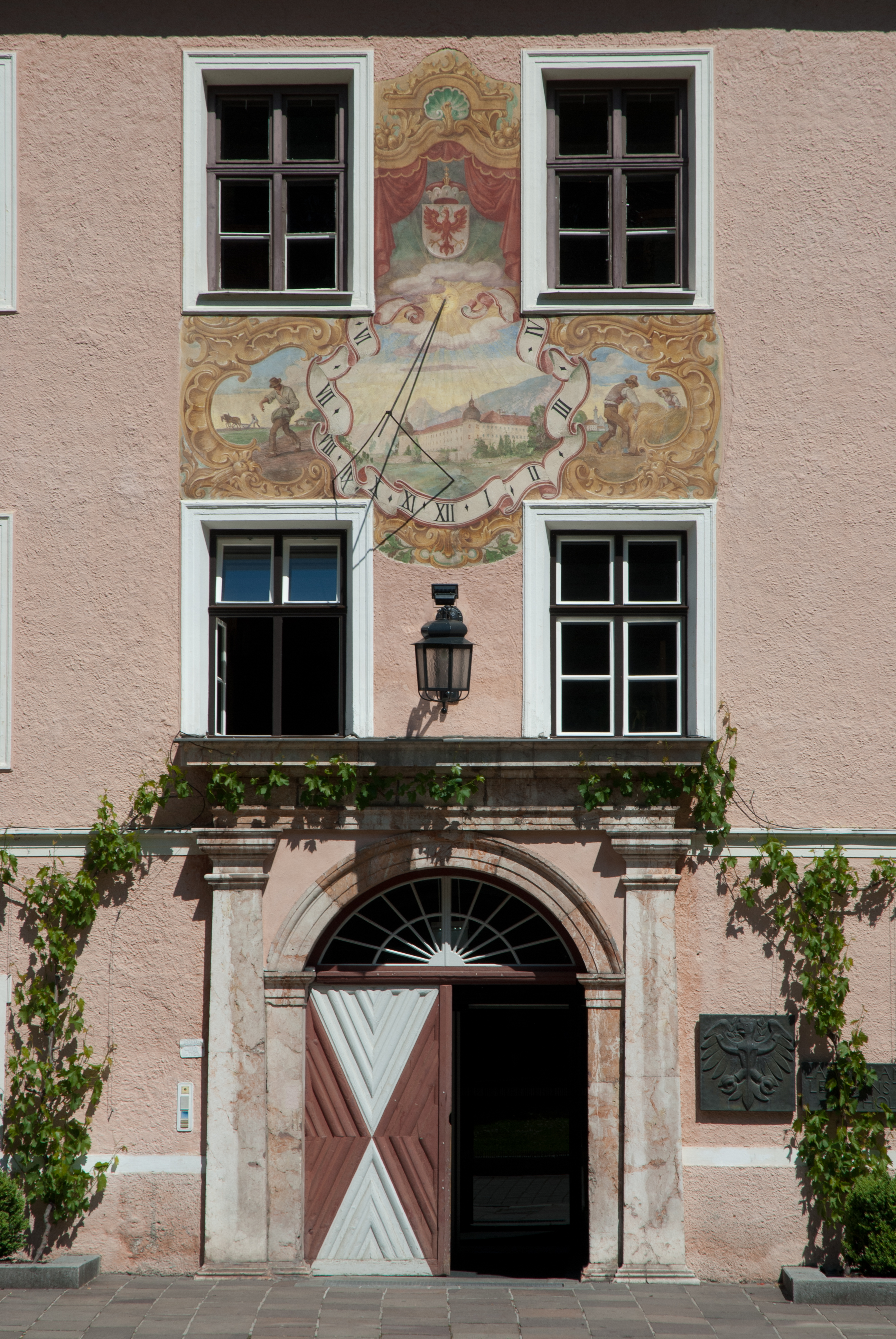 Landwirtschaftliche Lehranstalt Rotholz